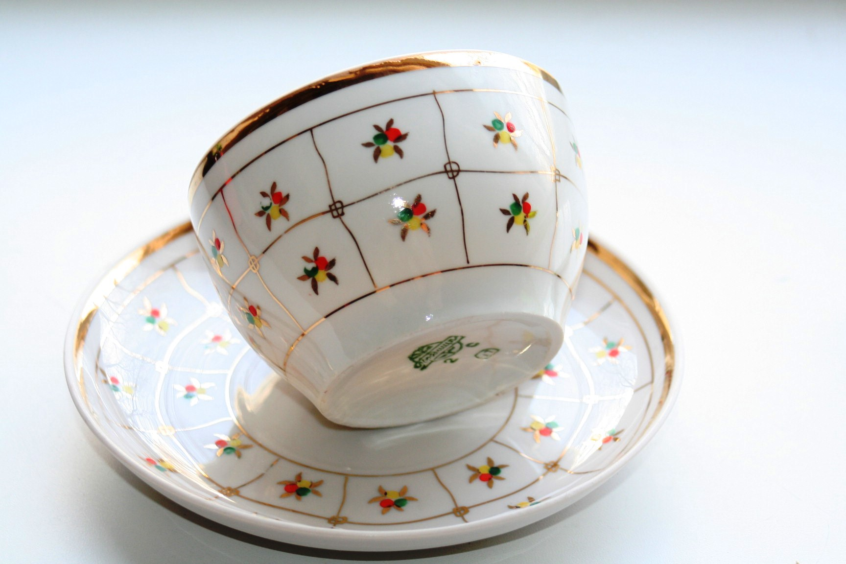 Чашка та блюдце від сервізу Городницького порцелянового заводу, клеймо кінця 1950-х-початку 1960 років. Ручний розпис.З приватної колекції.